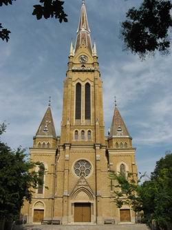 A topolyai Sarlós Boldogasszony templom - Saját készítésű kép licenc